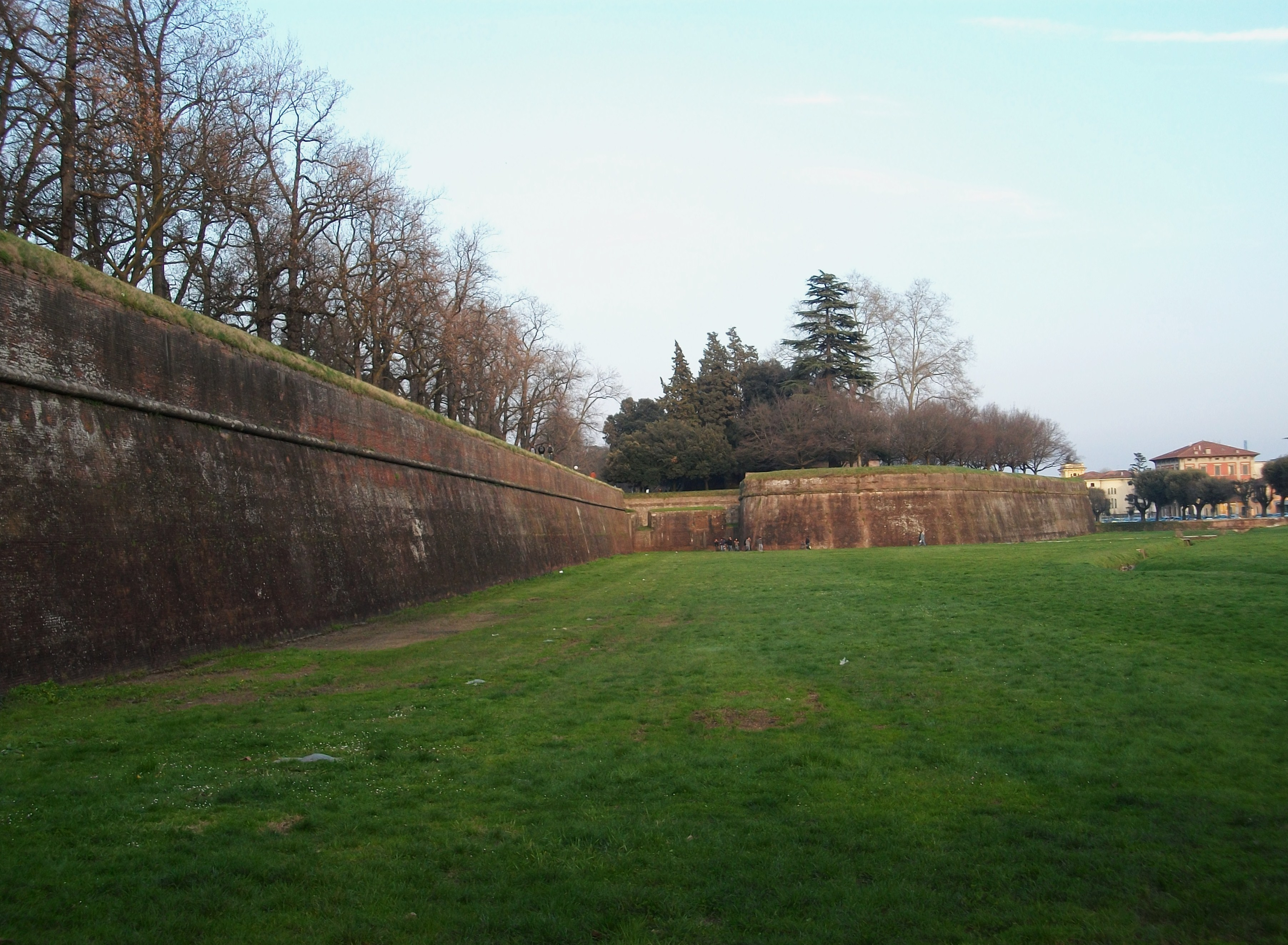 Lucca - muralles.